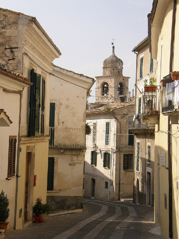 Caramanico Terme